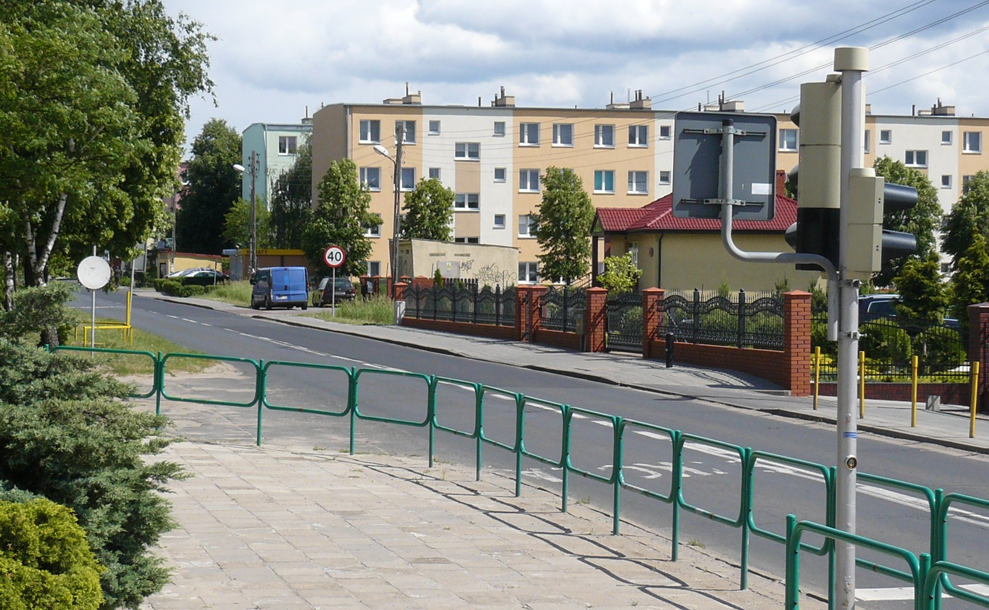 Bloki na Piotrowie w Poznaniu (Głuszyna).